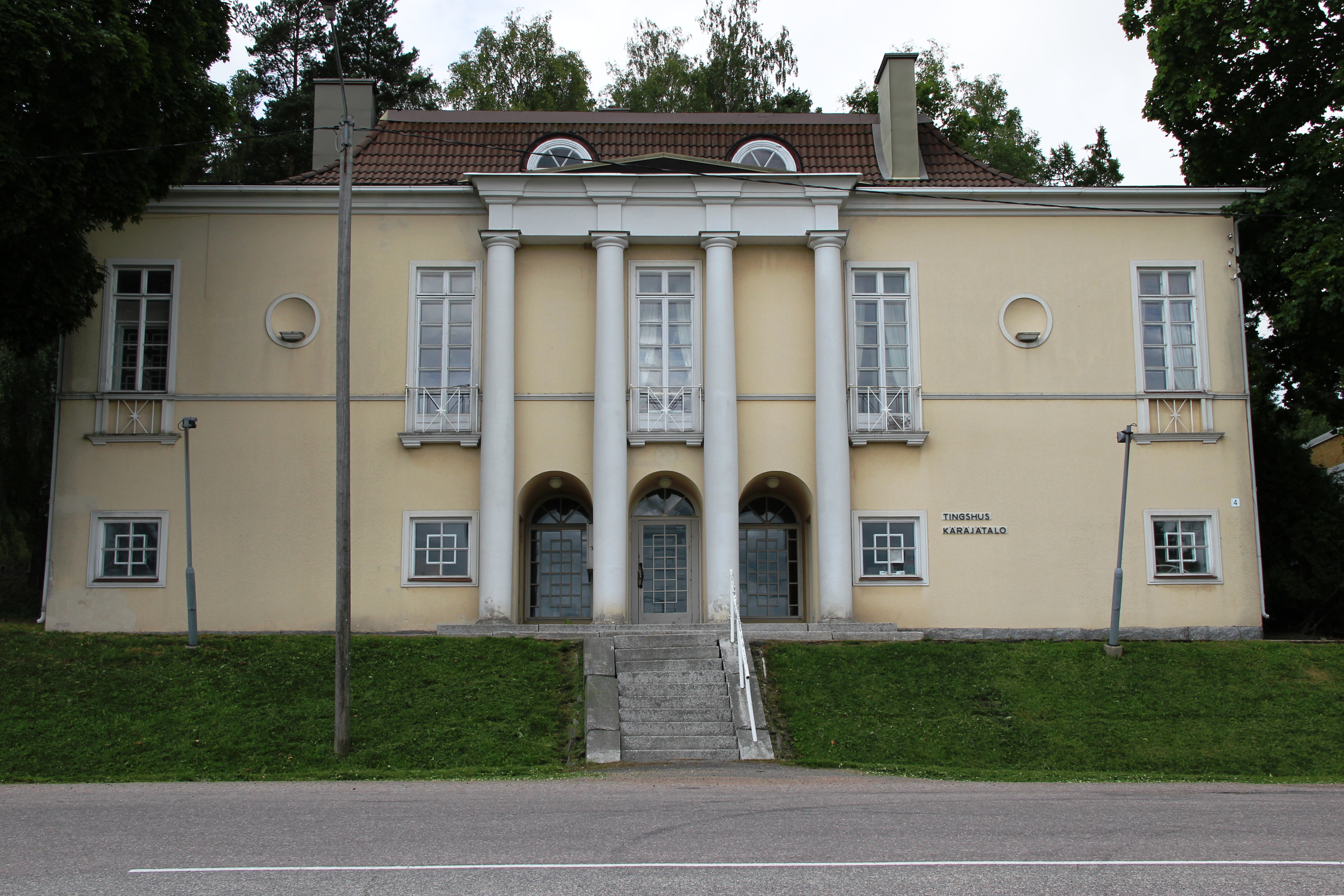 Kimito tingshus 2012, tidigare bank, Kimitoön, Finland